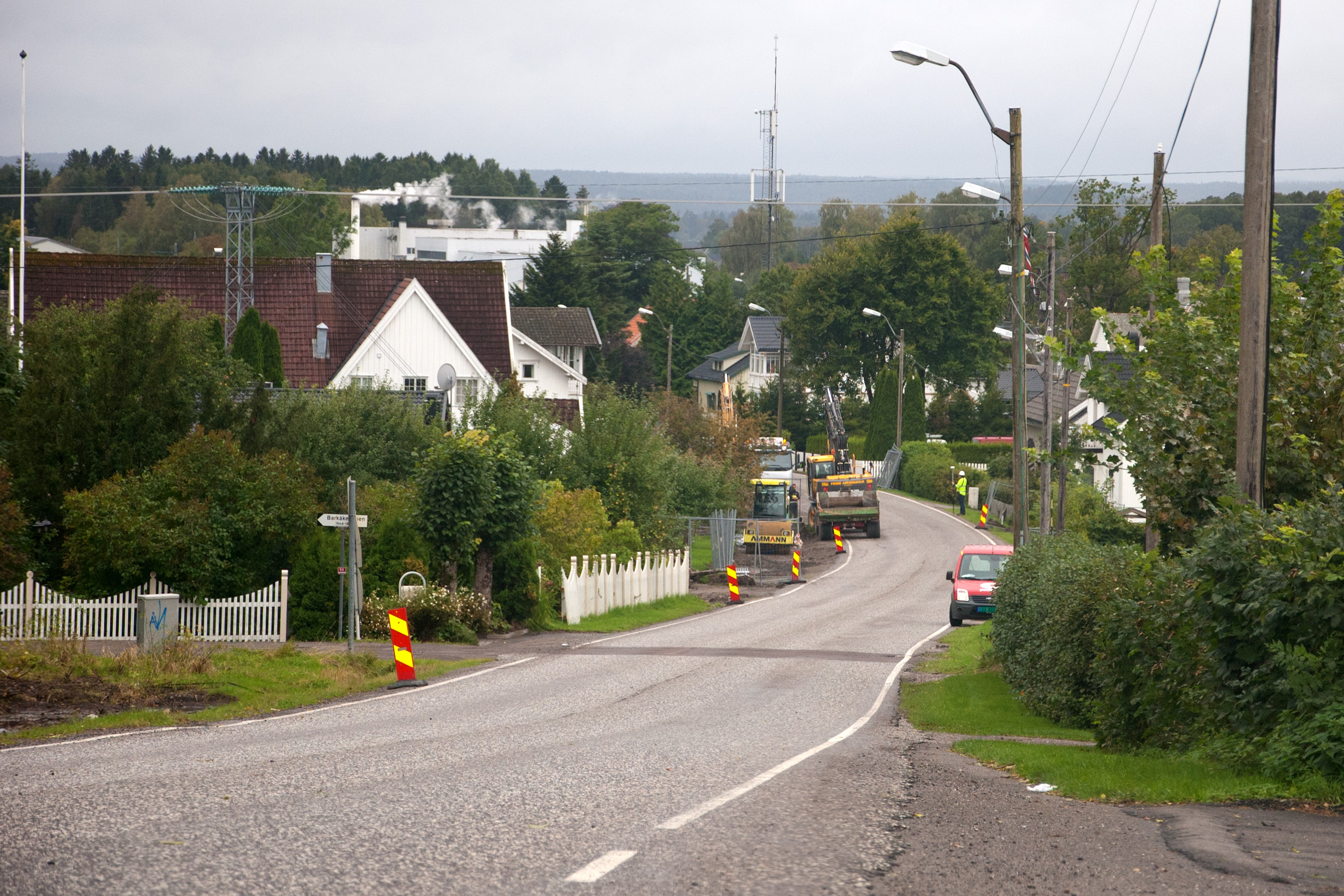 Fylkesvei 540 Barkåkerveien i Tønsberg, Vestfold